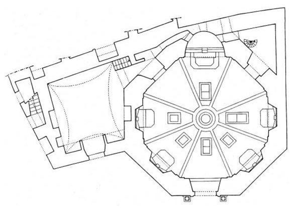 Pianta Monte dei Morti di Salerno